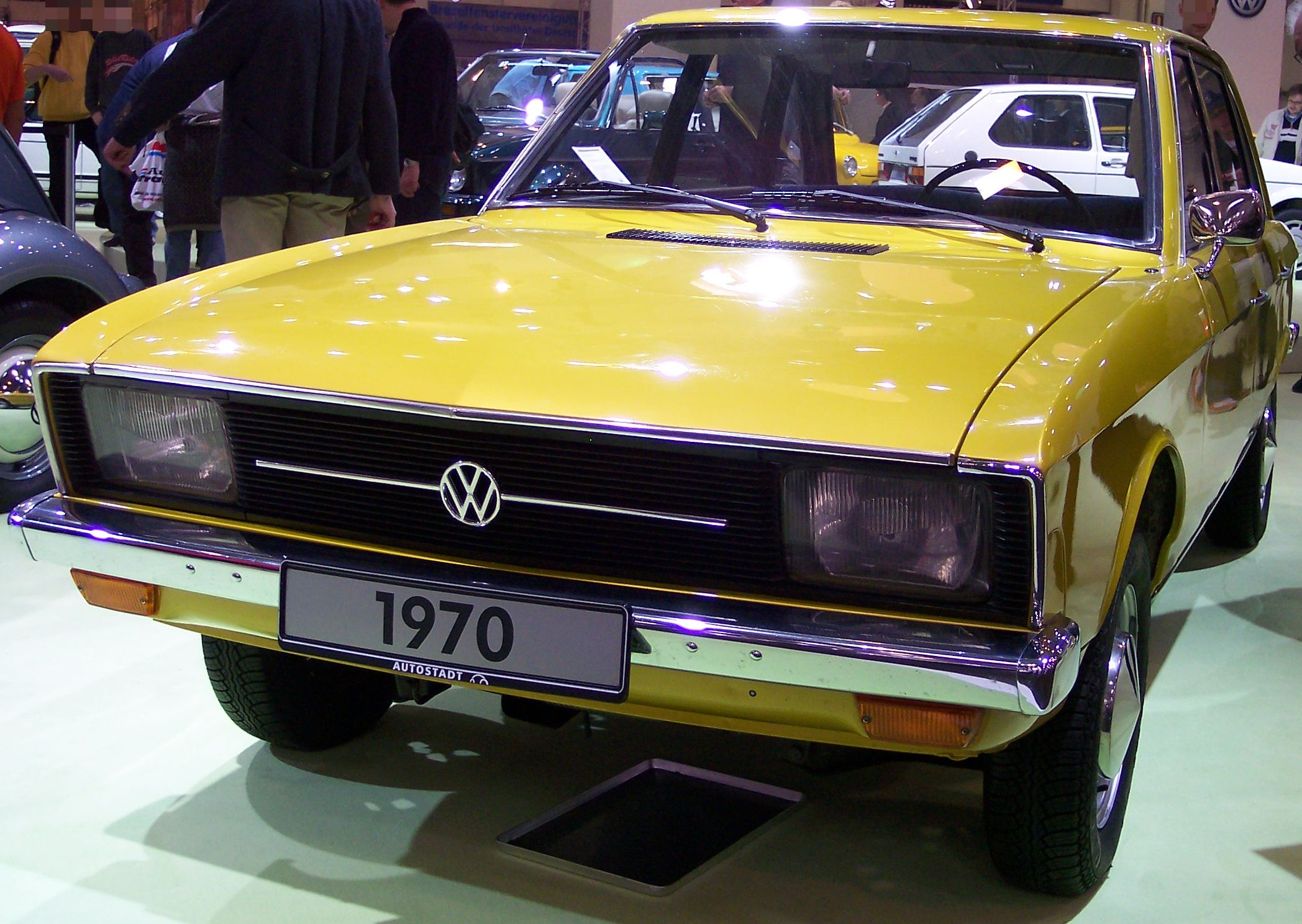 VW K70